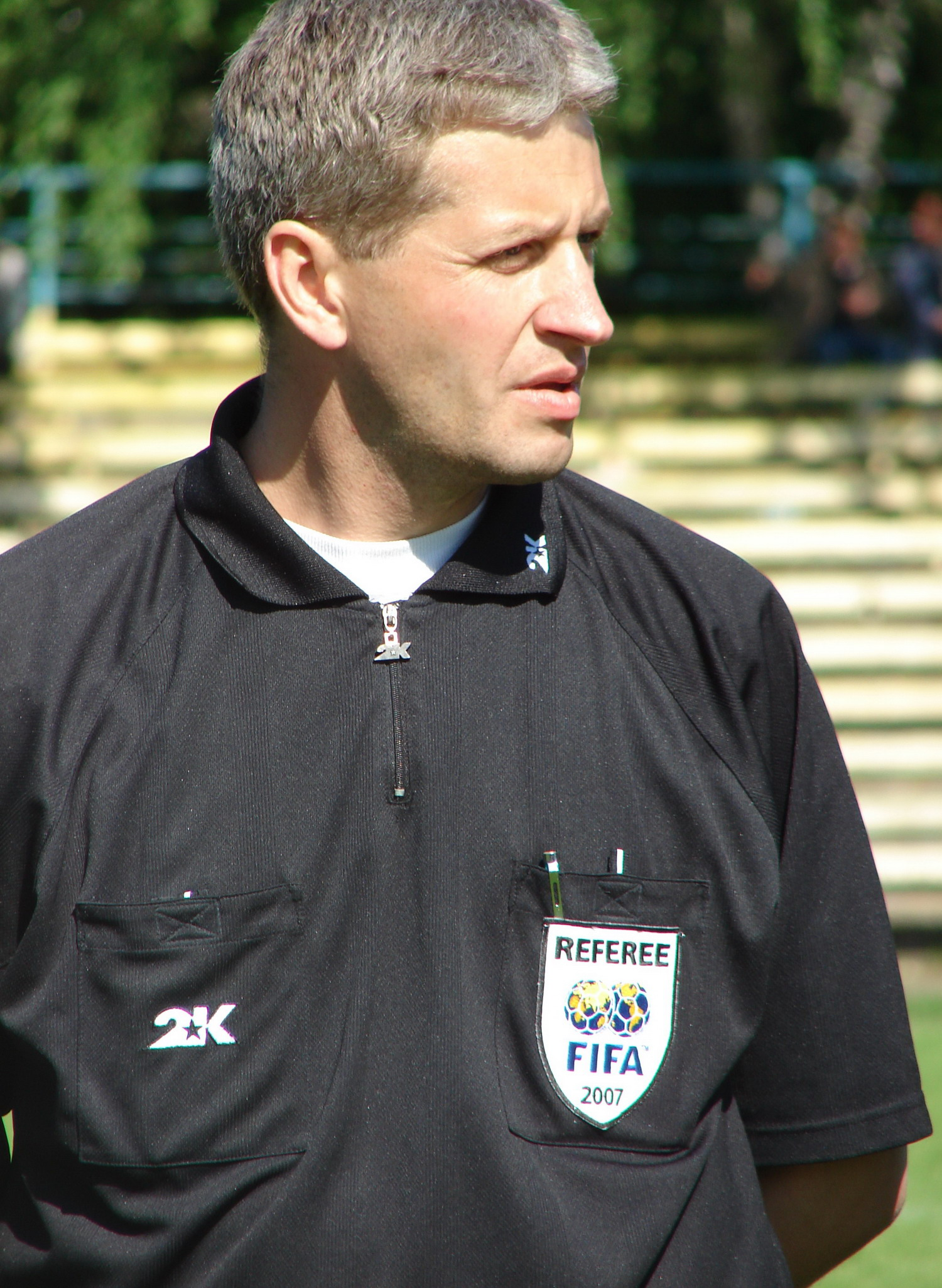 Российский судья Станислав Валерьевич Сухина